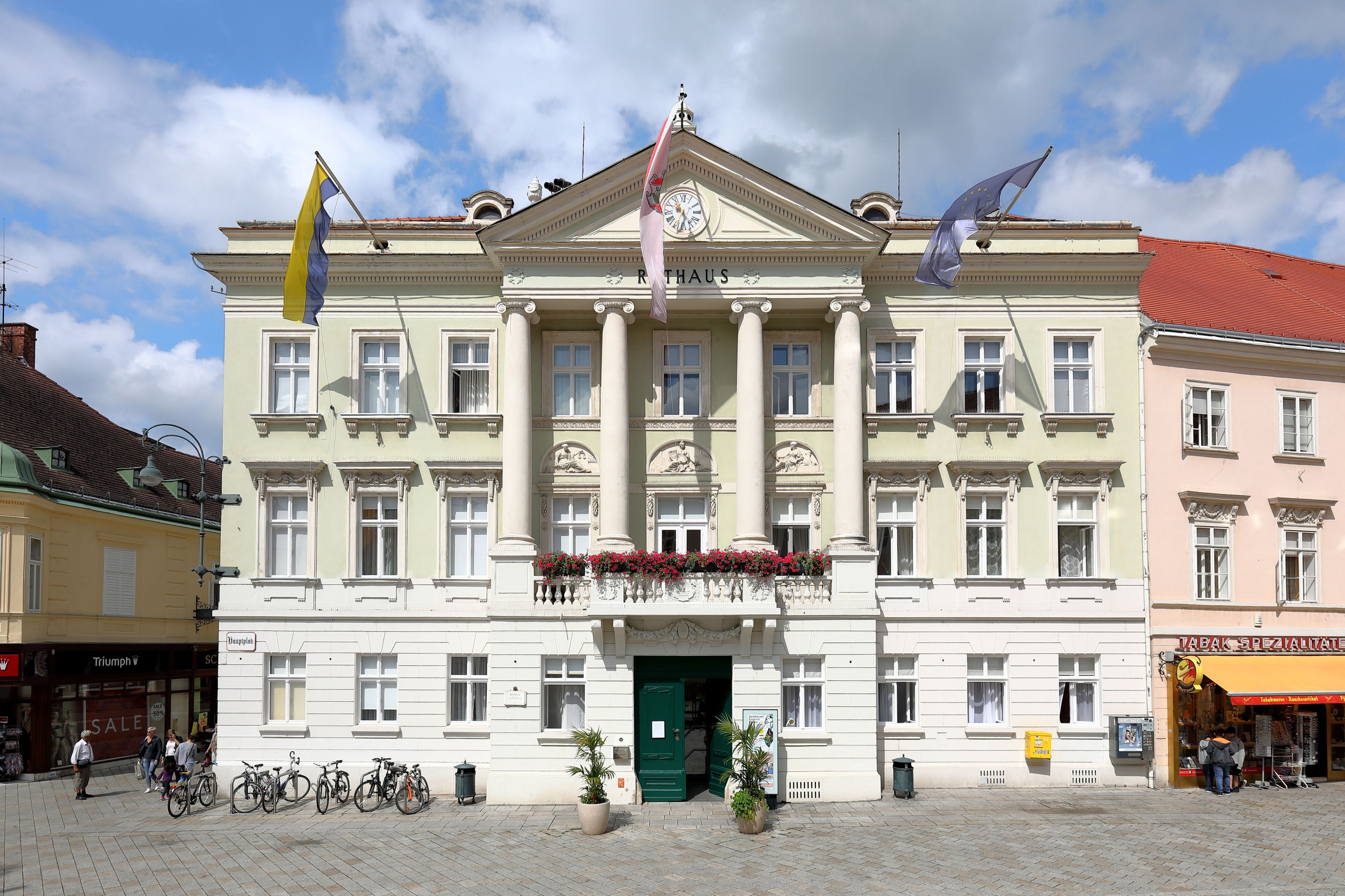 Das Rathaus an der Adresse Hauptplatz 1 in der niederösterreichischen Stadt Baden.Das heutige Rathaus wurde nach dem großen Stadtbrand vom 26. Juli 1812 anstelle des abgebrannten in den Jahren 1814/15 errichtet. Von 1893 bis 1895 wurde das Rathaus umgebaut und in Richtung Rathausgasse erweitert. Dabei wurde die Fassade im klassizistischen Stil beibehalten, jedoch durch Fensterrahmungen, Dachhäuschen und anderem im Sinne des Neoklassizismus nachstrukturiert.